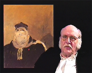 Portrait de Roger-Edgar Gillet